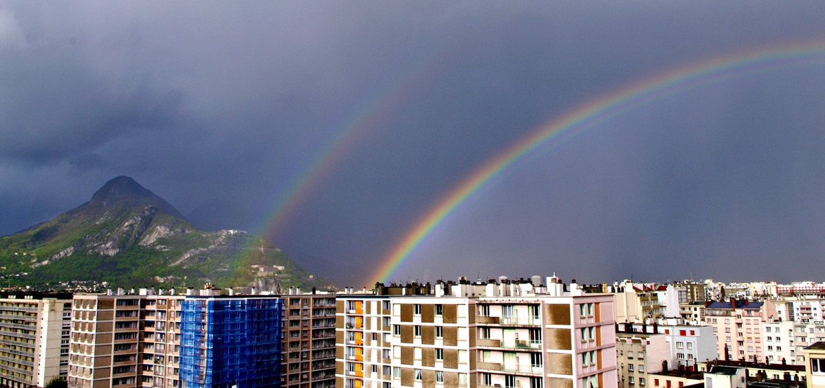 On voit bien la bande sombre entre les deux arcs-en-ciel. Grenoble, Isère, France.